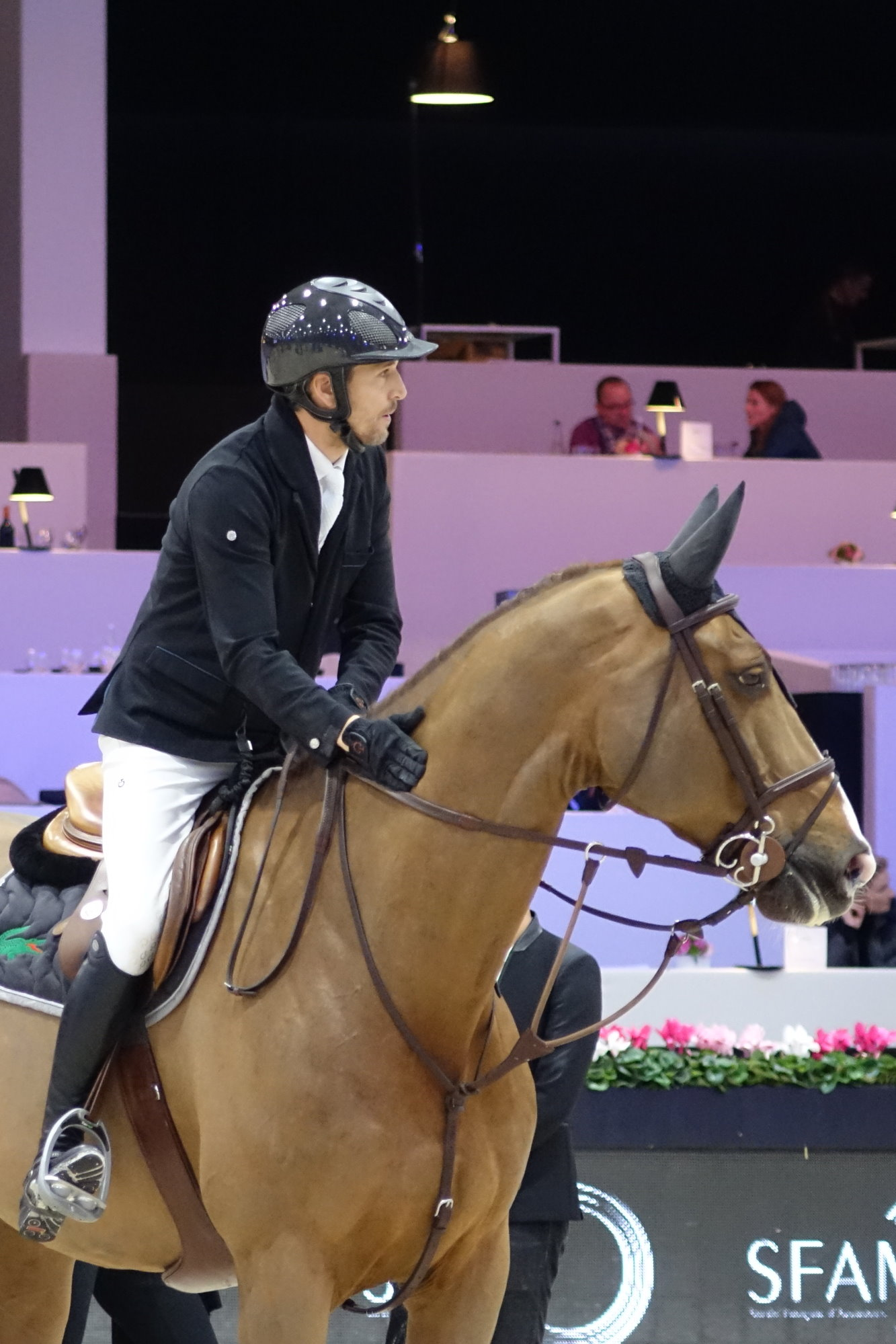 Guillaume Canet et Sweet Boy d'Alpa lors des Europe 1 Masters Two, CSI 2* des Longines Paris Masters, Salon du cheval de Paris 2017, Paris Nord Villepinte, Paris